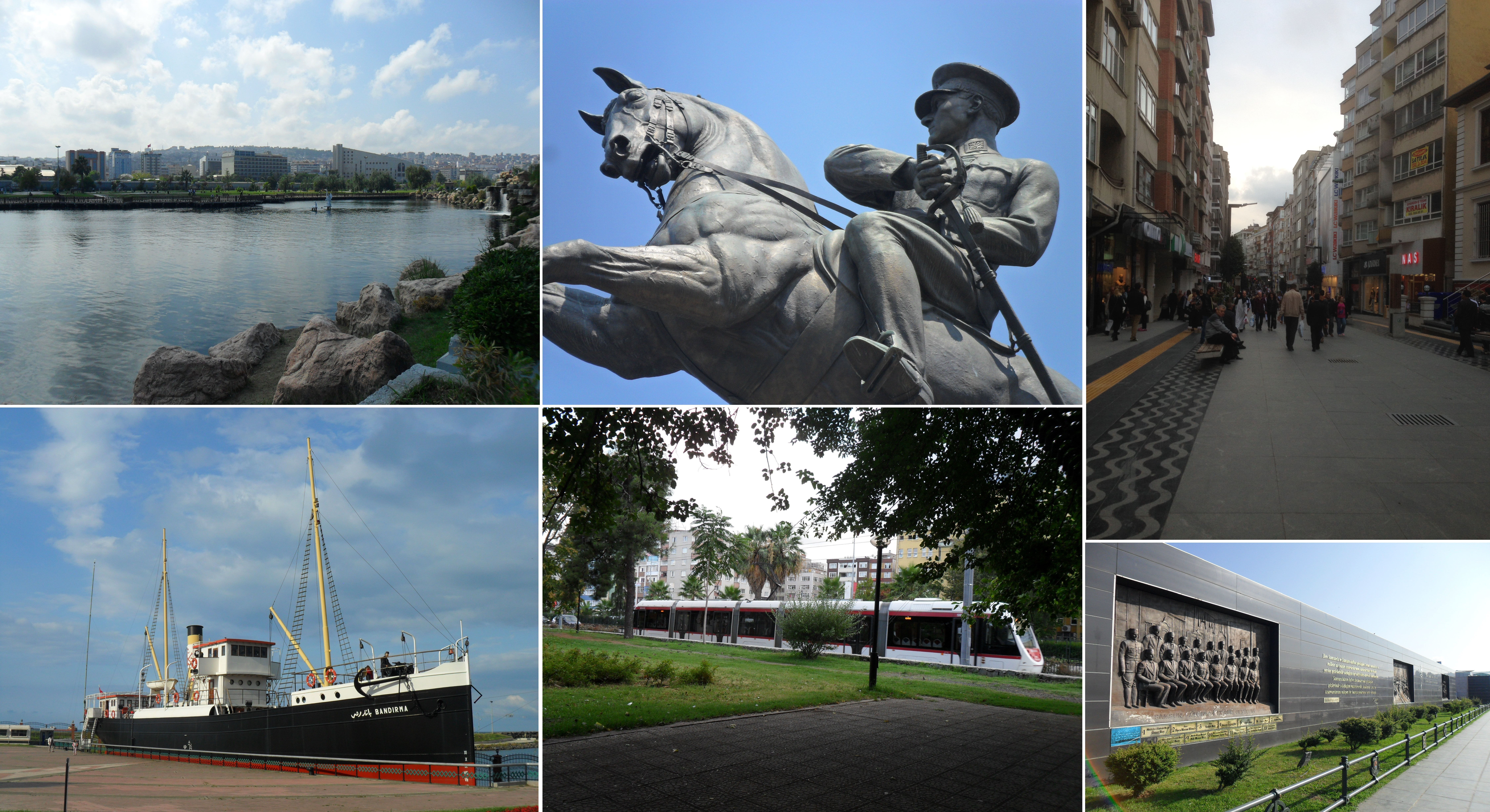 Genel Samsun kolaj çalışması.